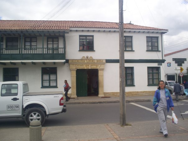 fachada principal de la alcaldia de Bosa